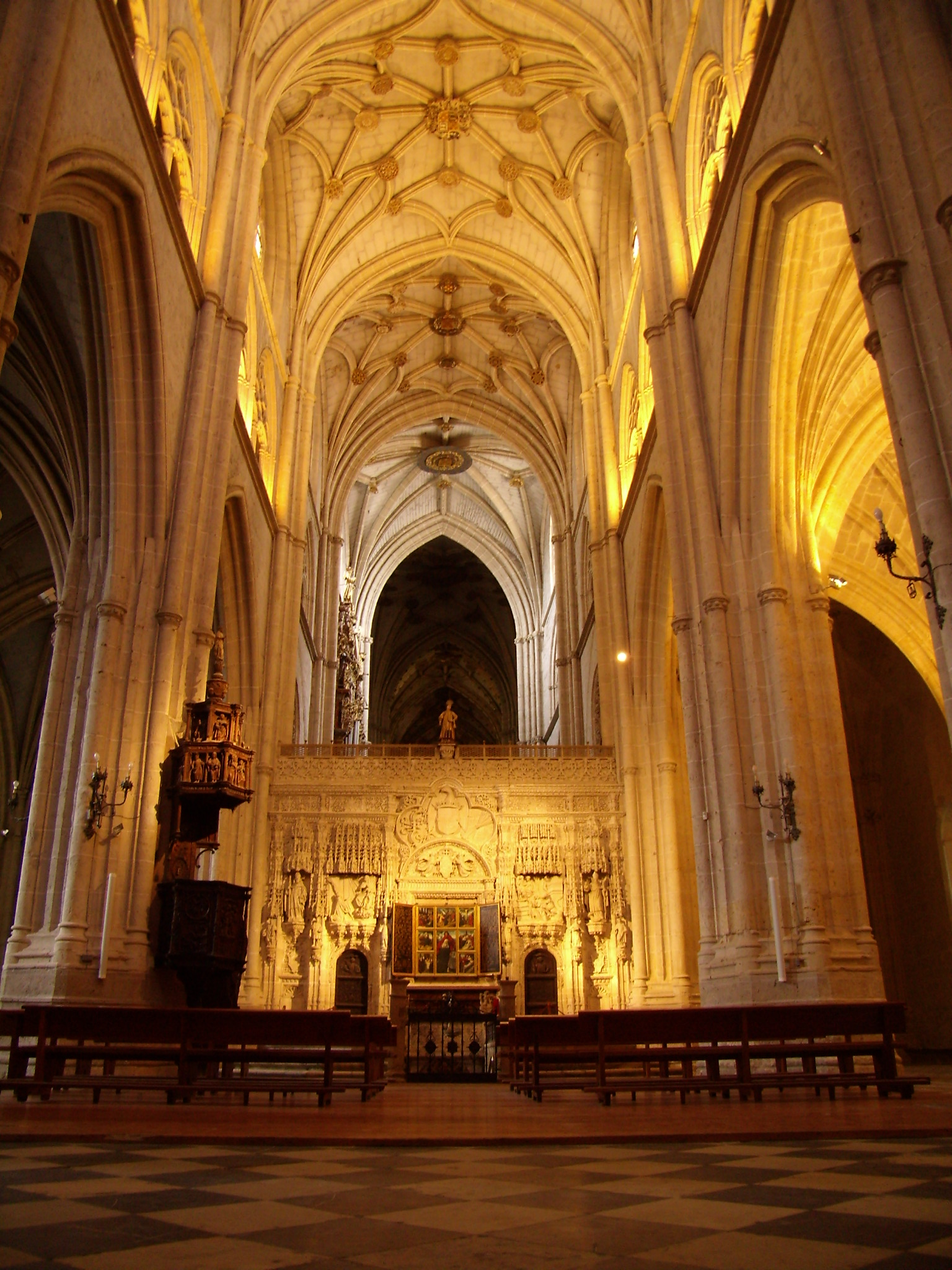 Catedral de Palencia, vista desde el trascoro